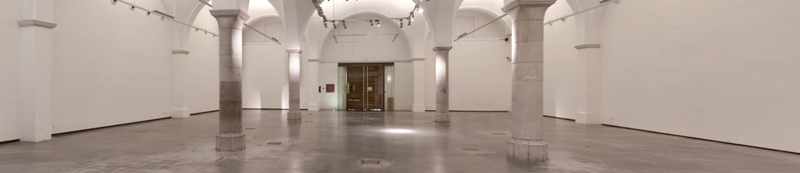 Panoràmica Sala de les Voltes